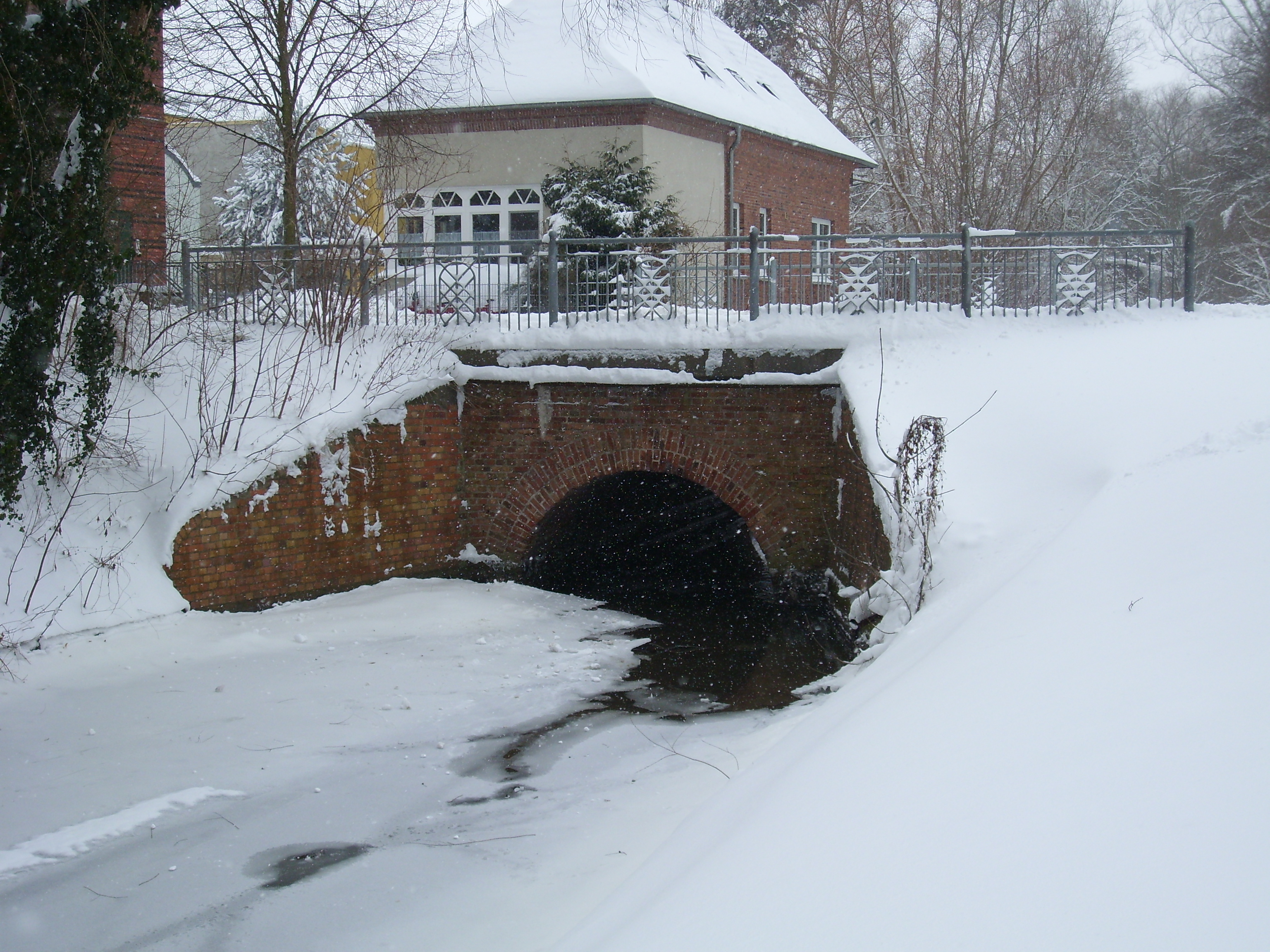 Straßenbrücke über den Stadtgraben (Rubenowstraße) von Osten aus gesehen